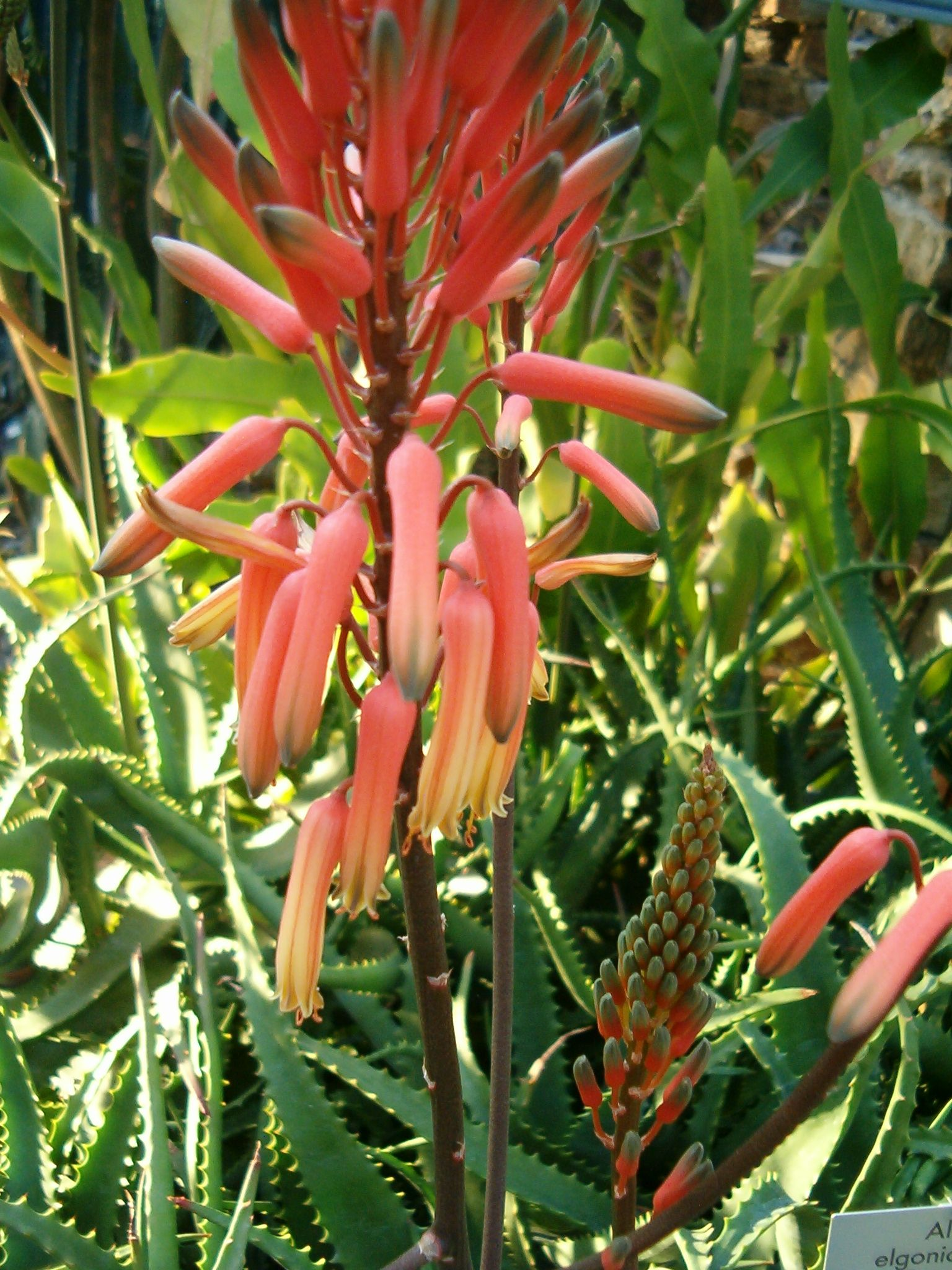 Aloe elgonica Location: Botanical Gardens Berlin Inflorescence